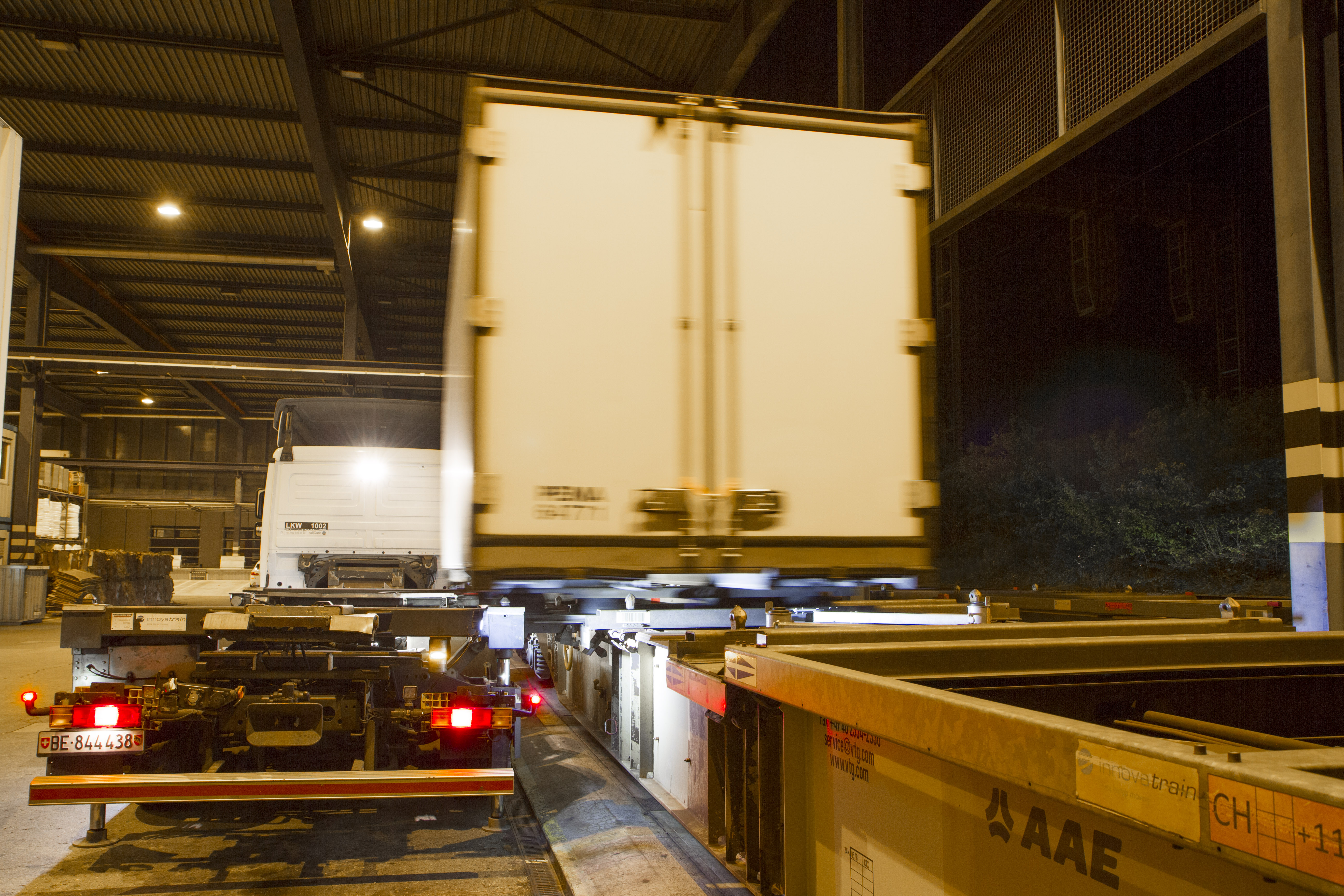 Umschlag im Hub Bern mit dem ContainerMover CM-3020